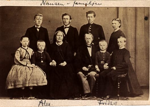 Семейство Нансен